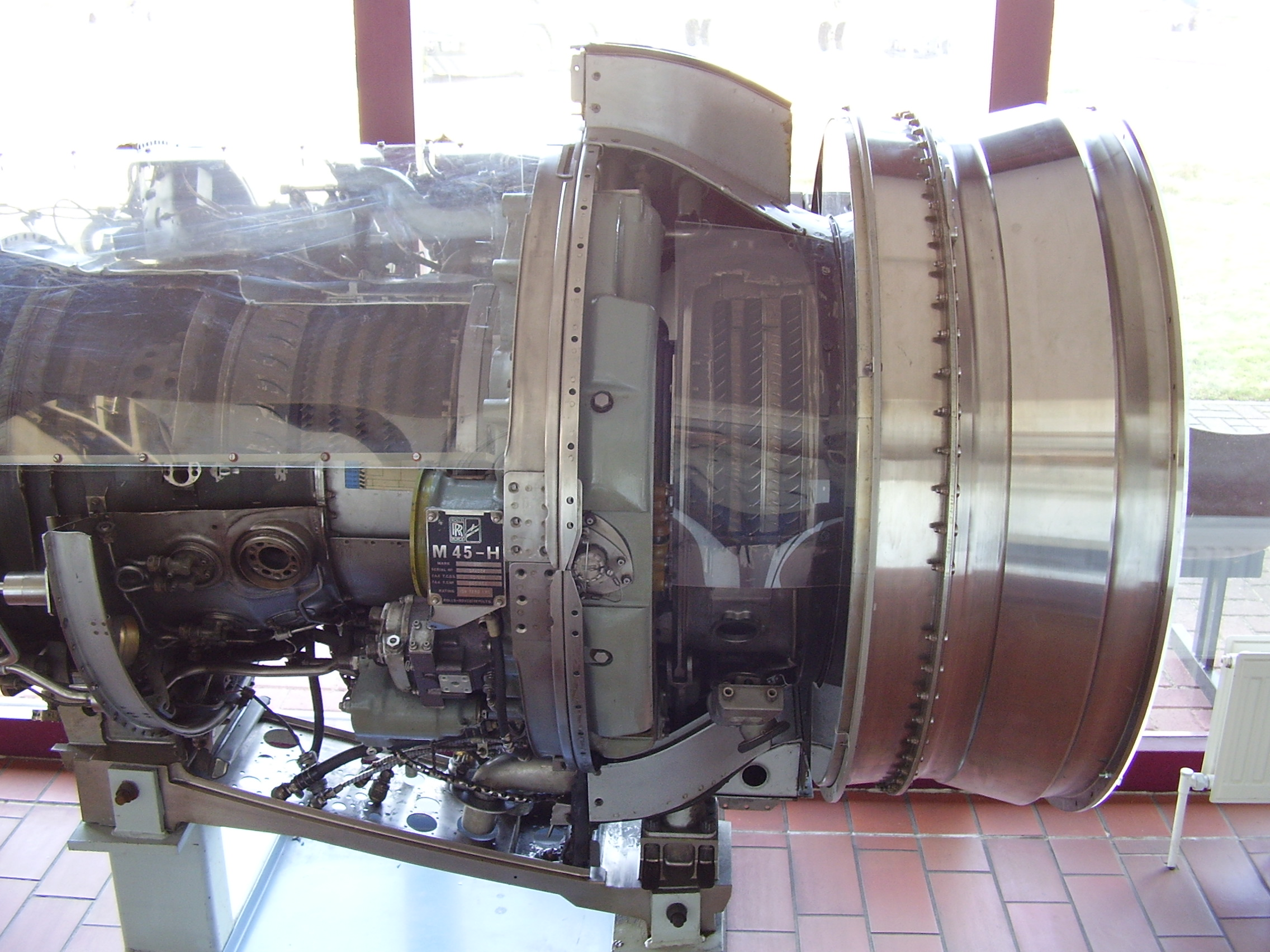 Aeronauticum in Nordholz, Luftschiffe, Zeppelin, bei Cuxhaven, Luftfahrtmuseum